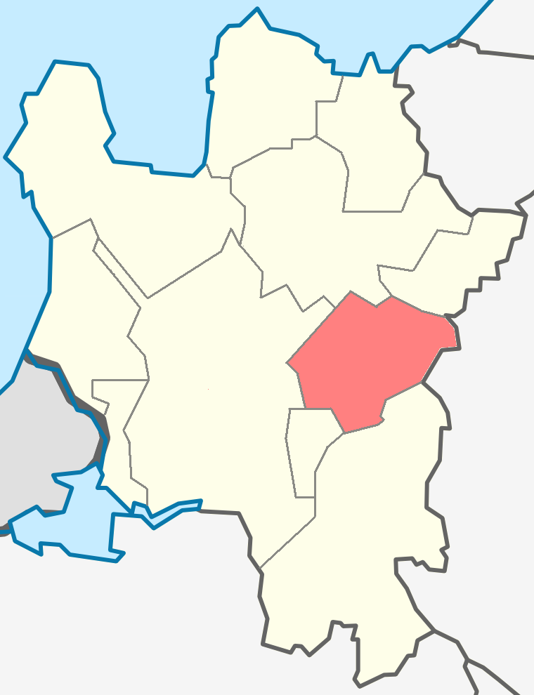 Опольевское сельское поселение на карте Кингисеппского района